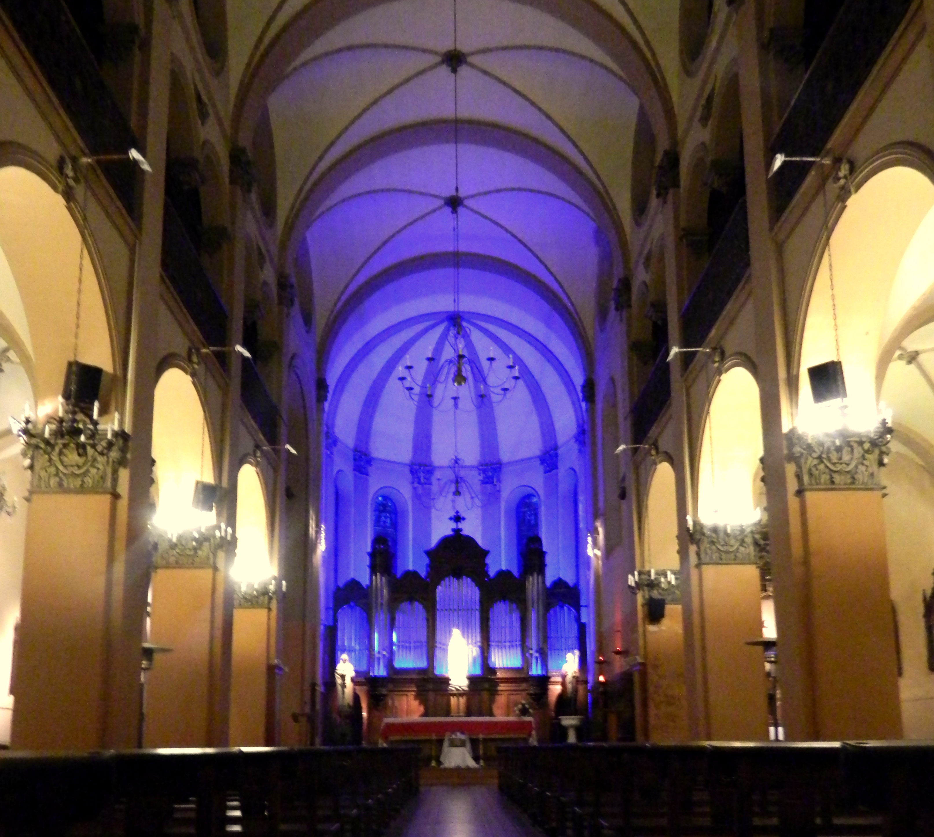 Iglesia de la Parroquia de San José - Iglesia de los Vascos. Ubicada en el departamento de Montevideo